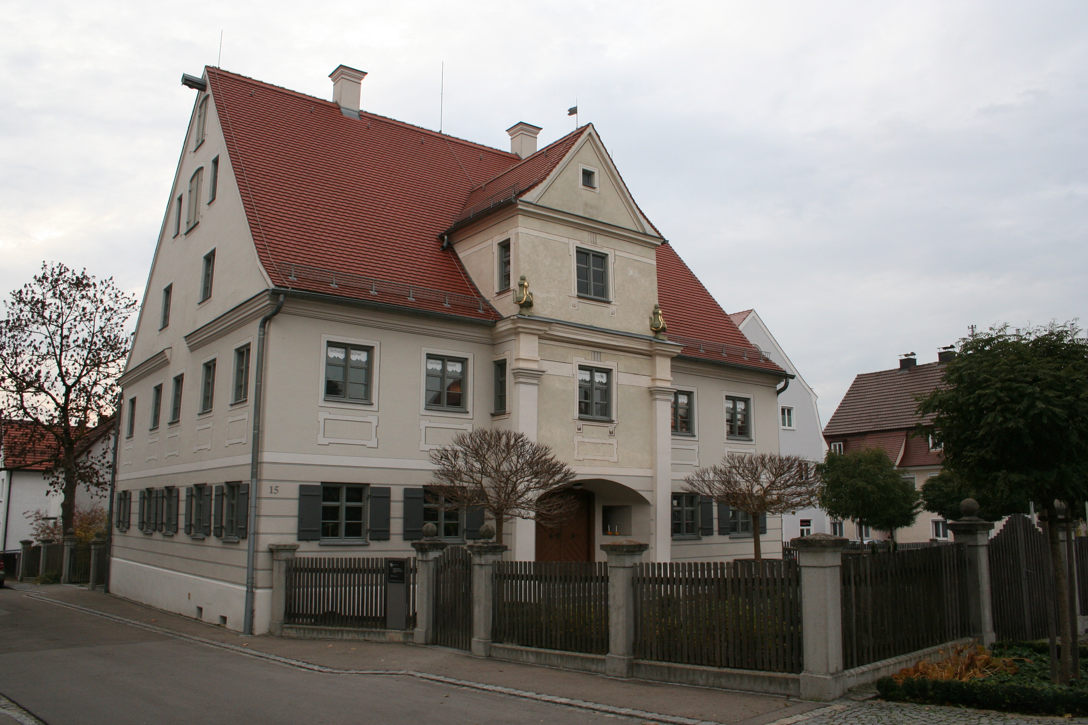 Landauer-Haus in Krumbach (Hürbener Straße 15; Baudenkmal); beherbergt heute die Trachtenforschungs- und beratungsstelle des Bezirks Schwaben